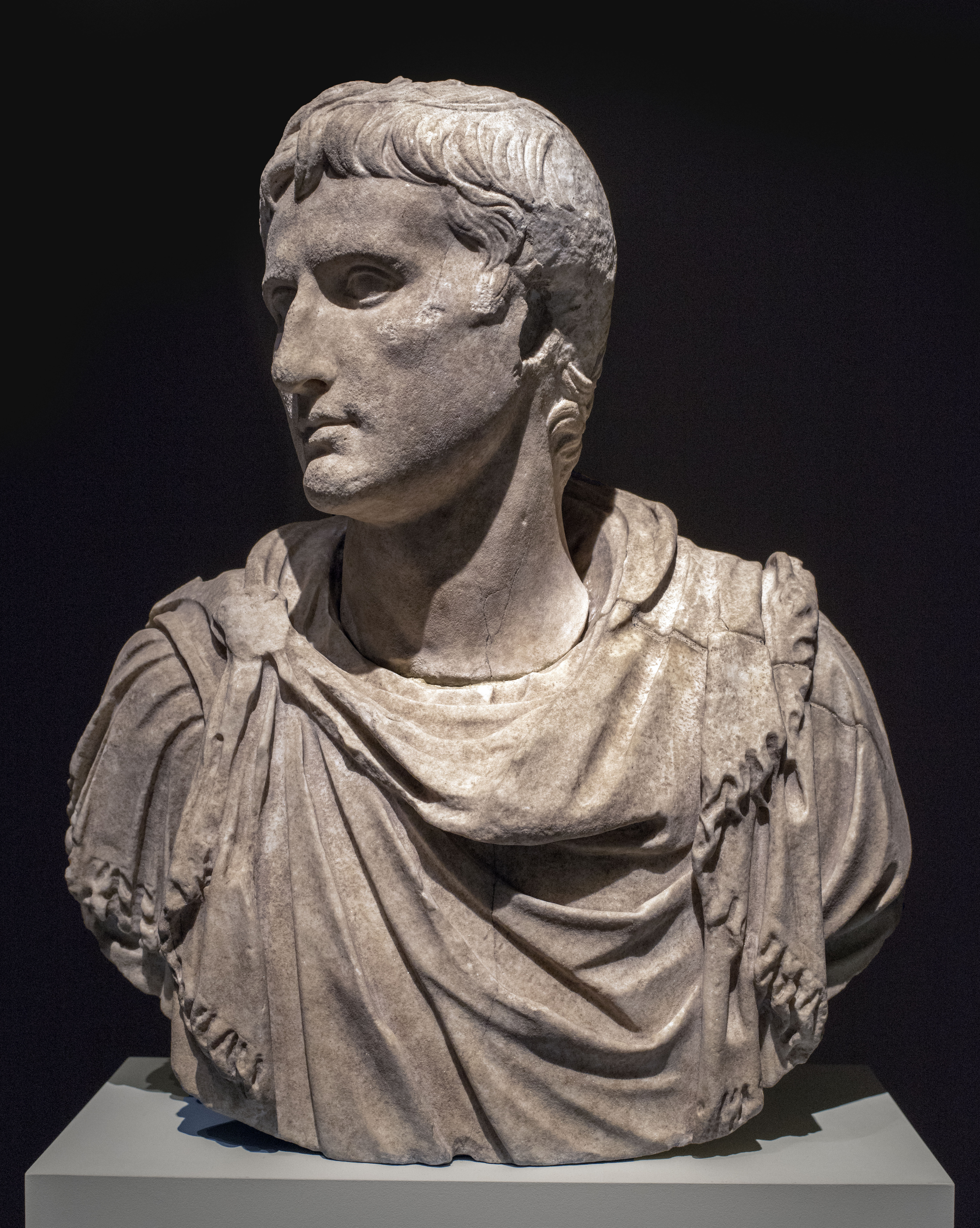 Cabeza y busto, ambas en mármol, son de épocas diferentes: siglo I y siglo II d.C. respectivamente Pertenece al Museo Archeologico Nazionale, en Formia, Italia. Se expuso en Arte Canal, Madrid, en "Cleopatra y la fascinación de Egipto".